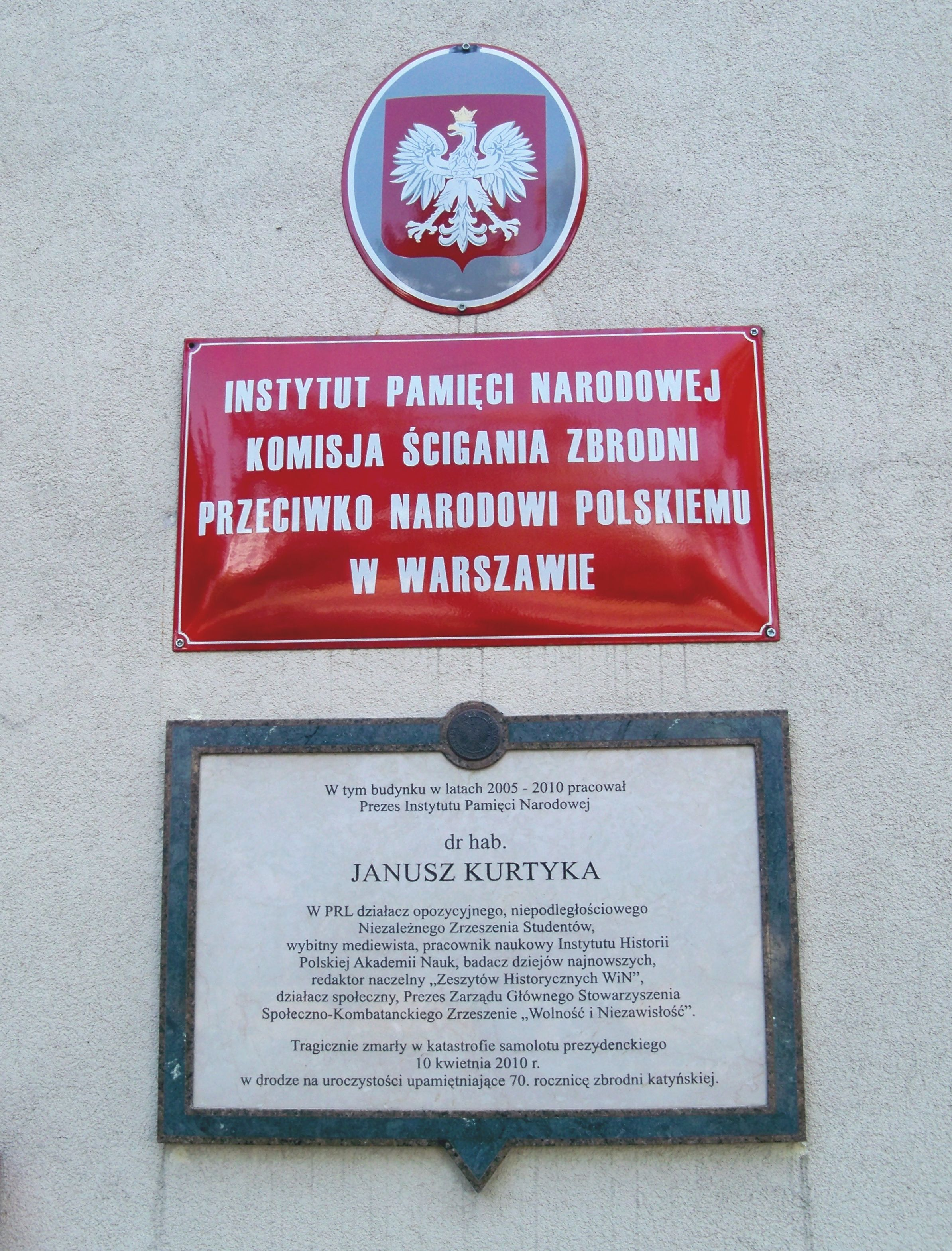 Siedziba IPN w Warszawie na ul. Towarowej 28 – godło, szyld i tablica upamiętniająca Janusza Kurtykę